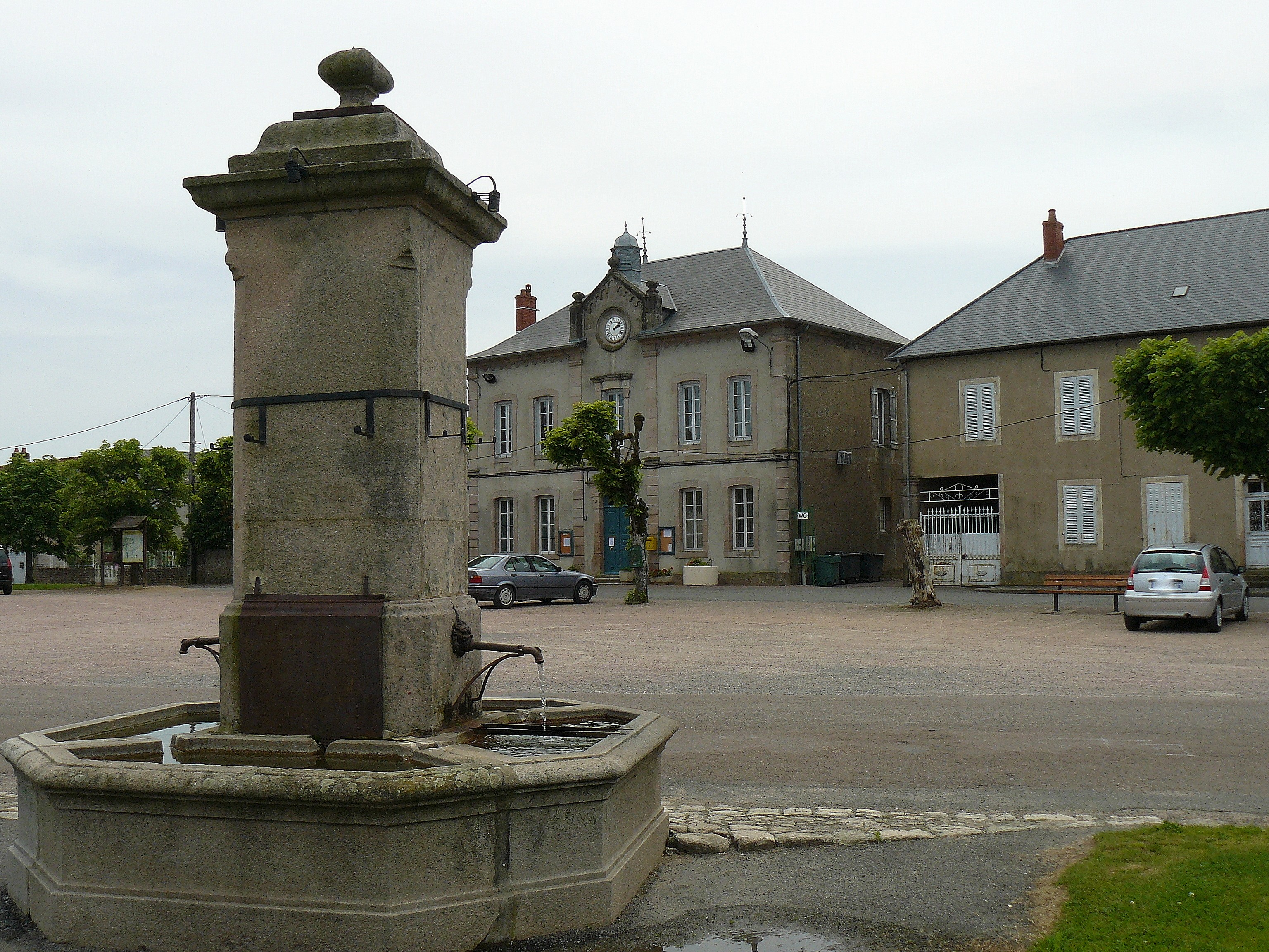 Fontaine et mairie à Saint-Léger-sous-Beuvray (Saône-et-Loire, France)